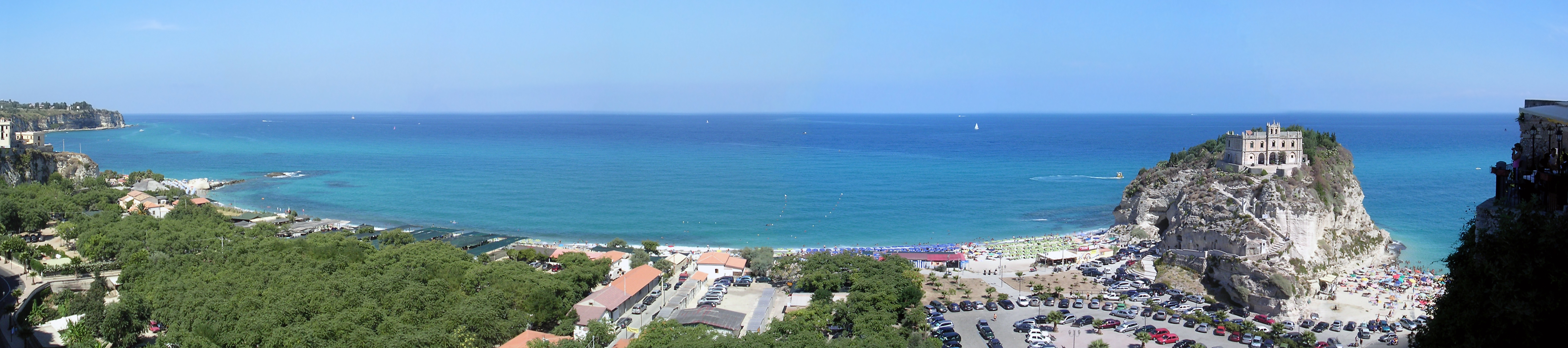 Tropea, Calabria, Italia.